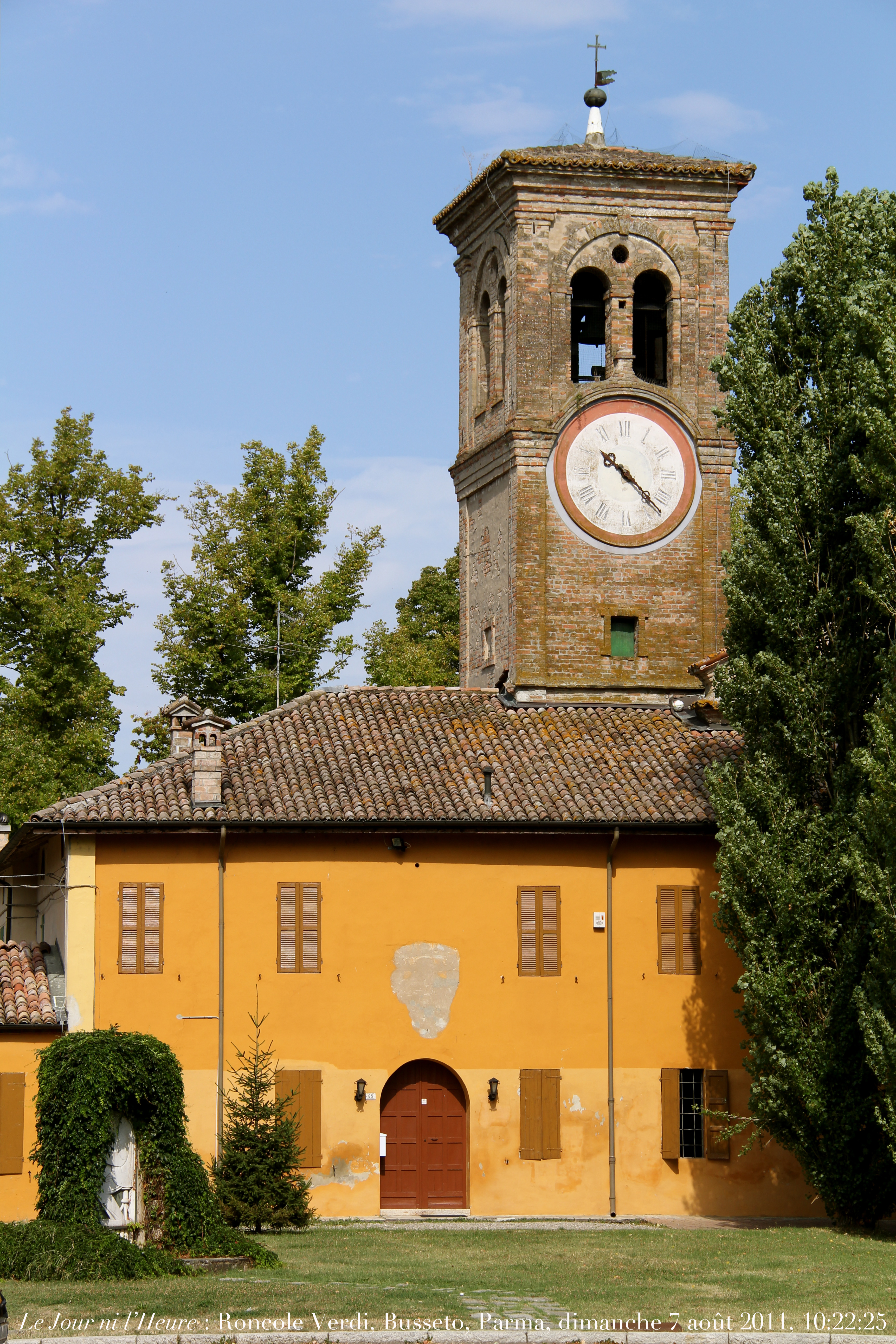 Vue prise de la maison natale de Giuseppe Verdi.